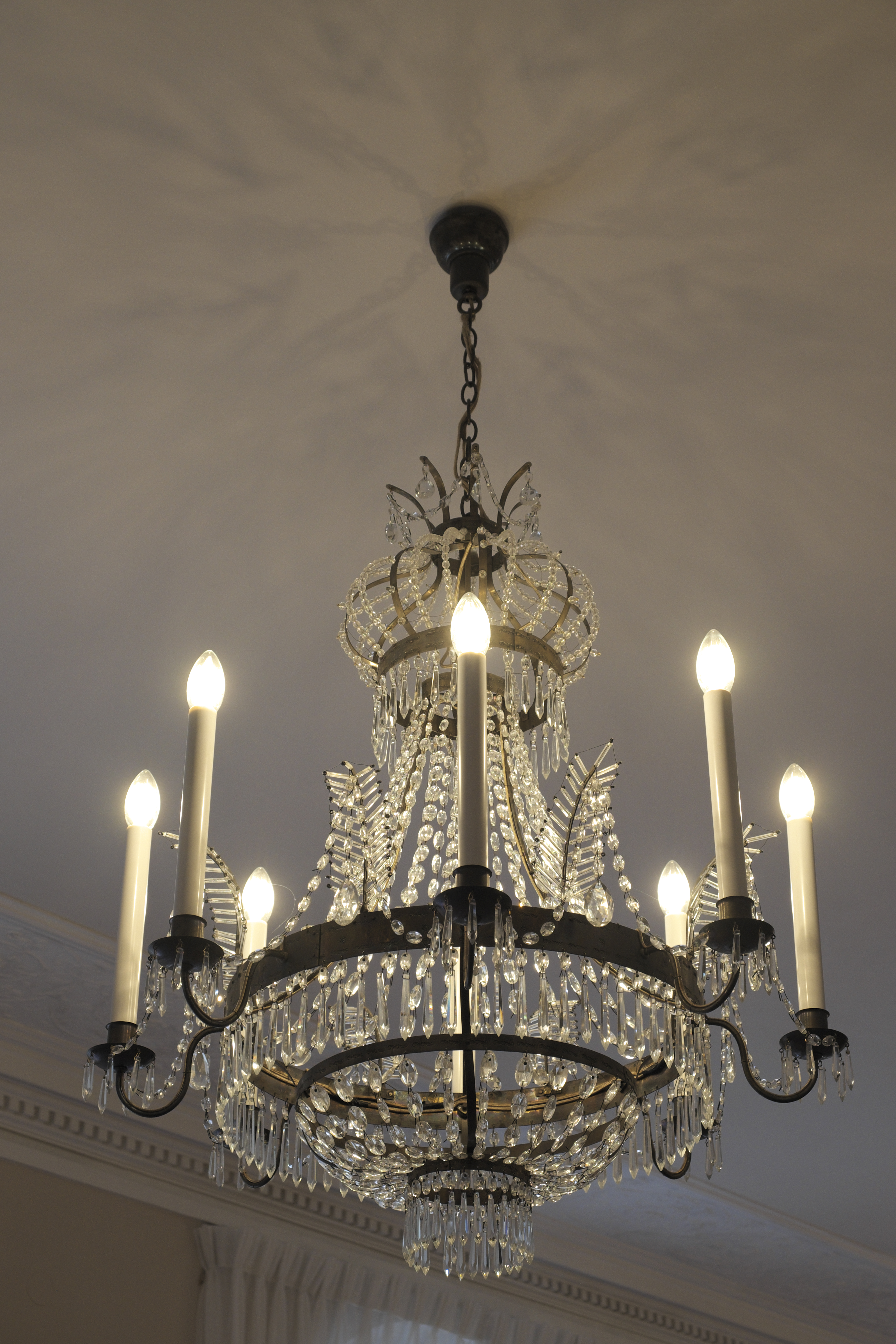 Schloss Suresnes in der Werneckstraße 24 im Stadtteil Schwabing (Stadtbezirk Schwabing-Freimann) in München (Bayern/Deutschland), heute Tagungshaus der Katholischen Akademie in Bayern, Kandelaber This is a photograph of an architectural monument.